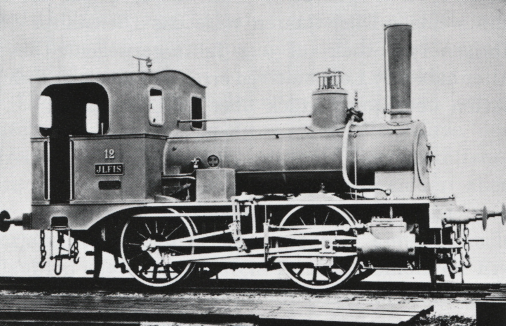 Tenderlocomotive B (ab 1887 E2, ab 1902 E 2/2) Nr. 12 Jlfis der Emmenthalbahn, gebaut 1881 inn der Schweizeriſchen Locomotiv- und Machines-Fabrique zů Winterthur (Fabr.-Nr. 211), 1907 außer Dienſt geſtellt und anſchließend abgebrochen.